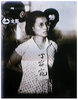 丁窈窕女士被補後